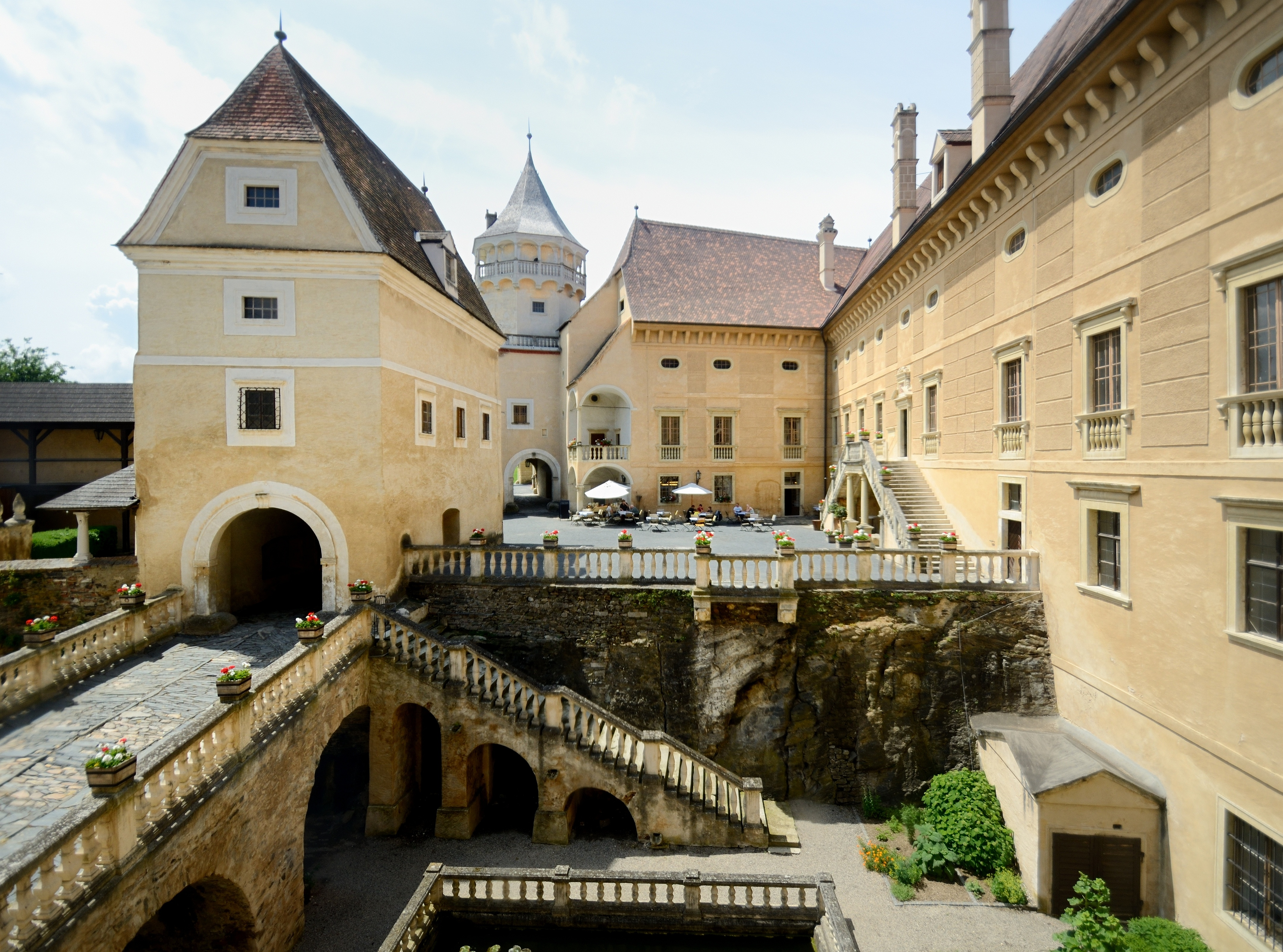 Schloss Rosenburg